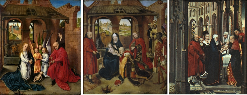 Composition de trois panneaux du polyptique de Hulin de Loo en un seul, d'assez mauvaise qualité